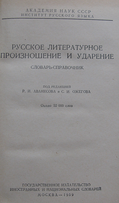 Description ТитулDate 1959Source Русское литературное произношение и ударениеAuthor Р. И. Аванесов, С. И. Ожегов Титул